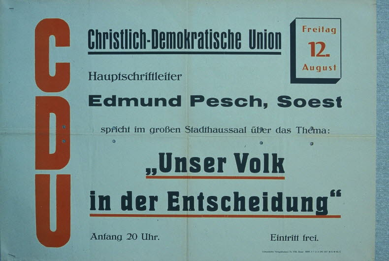 Ankündigungsplakat einer Veranstaltung mit Edmund Pesch, Christlich Demokratische Union Deutschlands